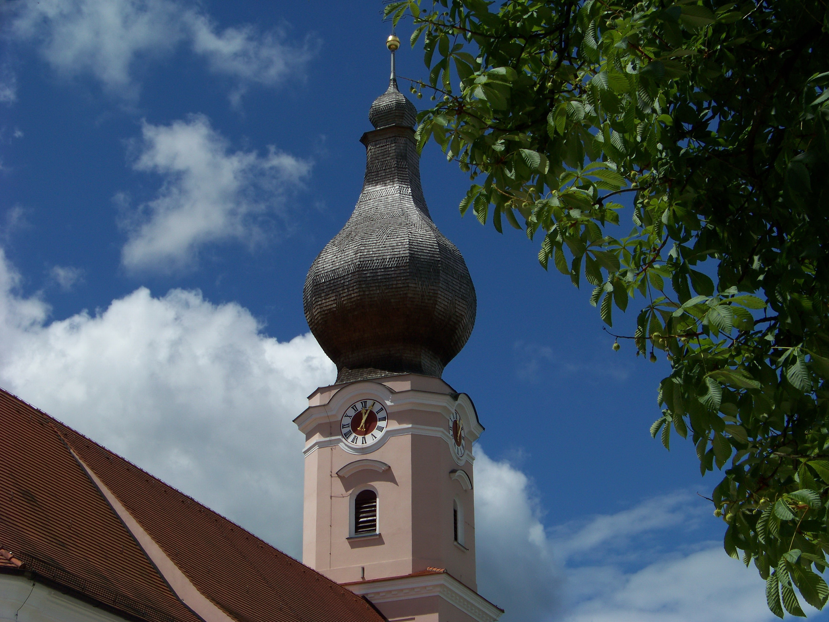 Moosthenning, Dreifaltigkeitsberg 1. Katholische Wallfahrtskirche Hl. Dreifaltigkeit. Barocker Saalbau mit Westturm, wohl von Georg Weigenthaller, begonnen 1693, Weihe 1714, Turm 1739, nach Blitzschlag durch Georg Felix Hirschstötter d. J. 1770 erneuert; mit Ausstattung.